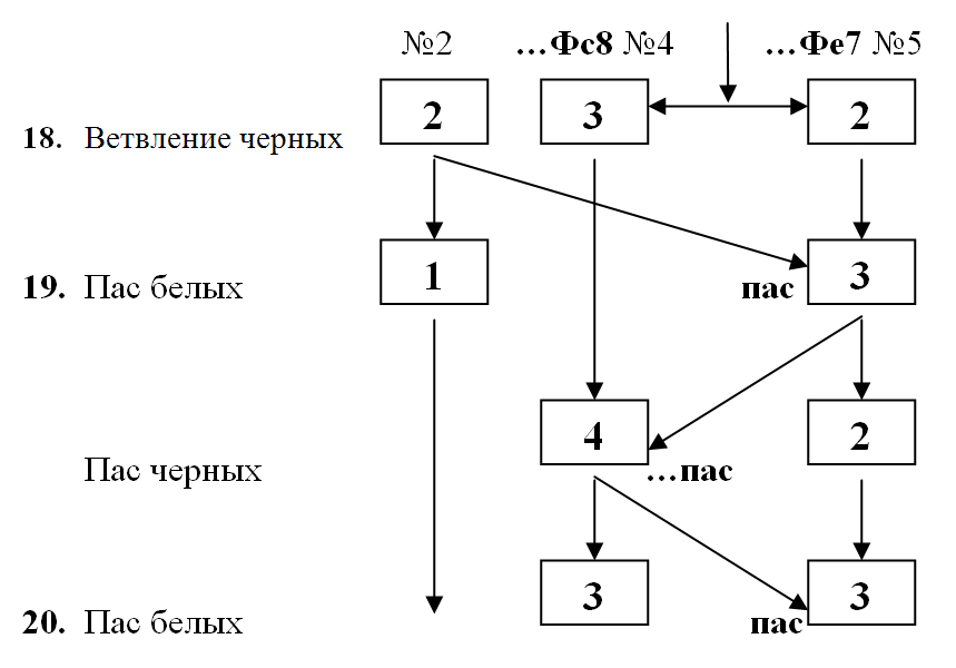 Шахматный Пас при игре в Деловые шахматы.